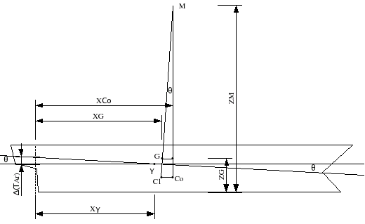 Ship stability